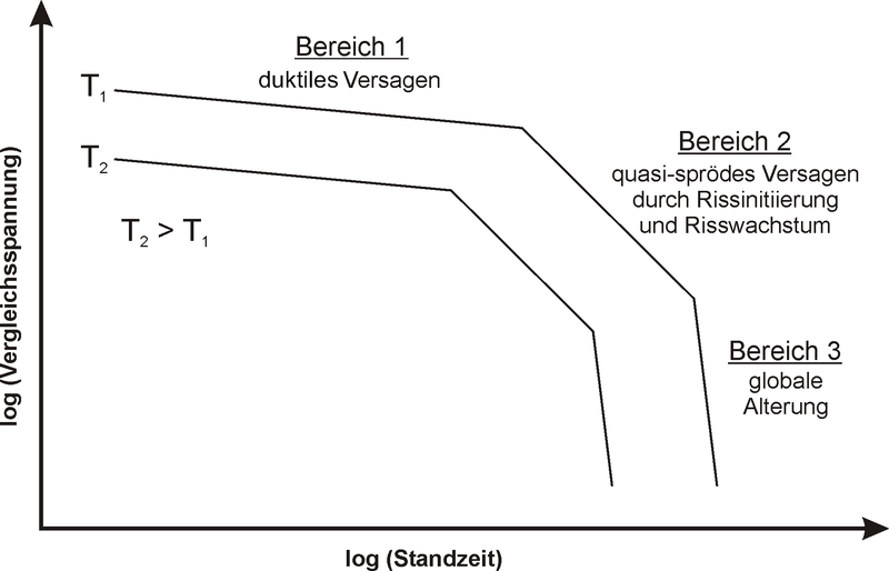 Zeitstandinnendruckverhalten und mögliche Versagensfälle von Polyethylen-Rohren (ist jedoch auch für andere themoplastische Kunststoffe gültig)